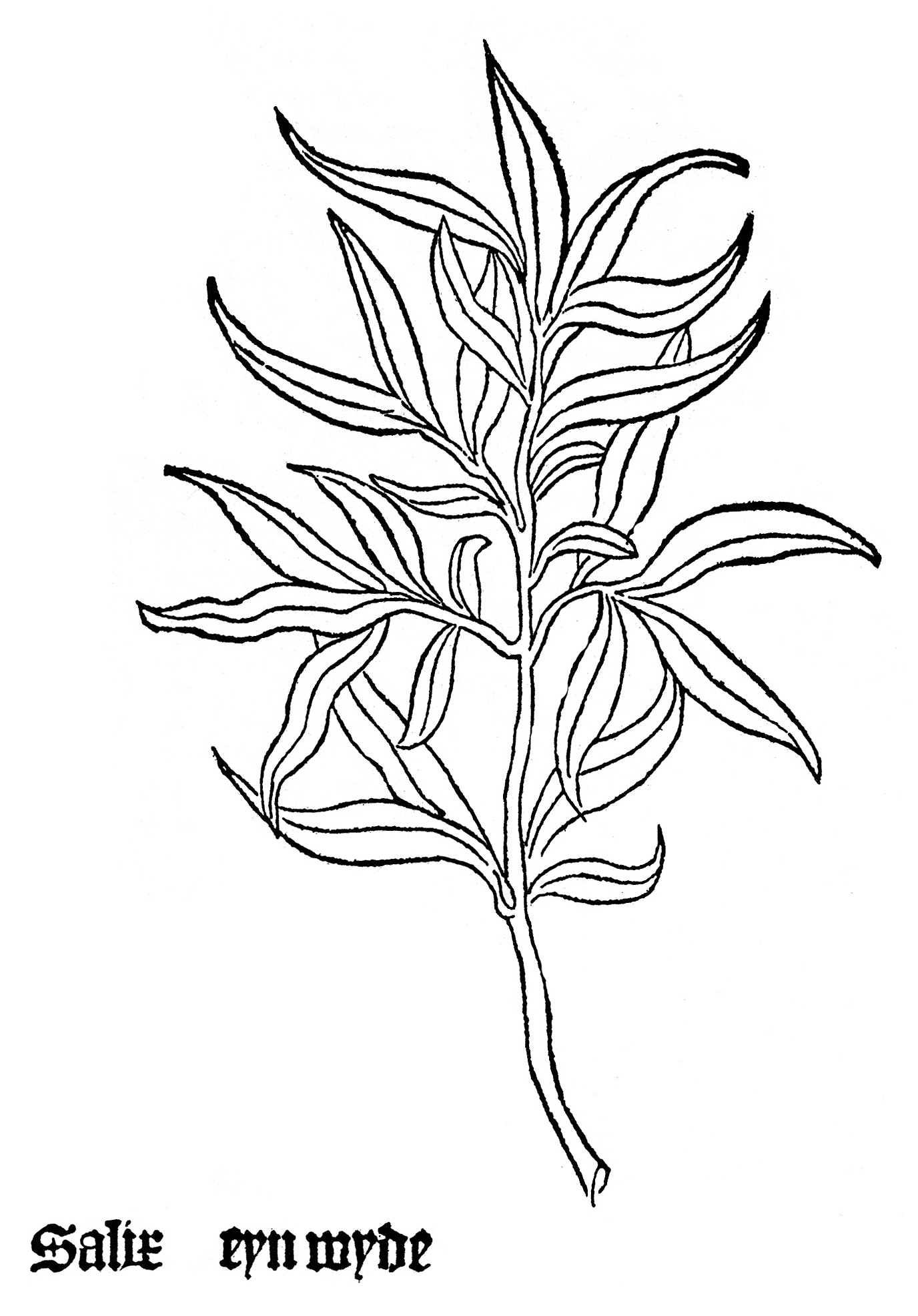 Abbildung der Weide (Salix)